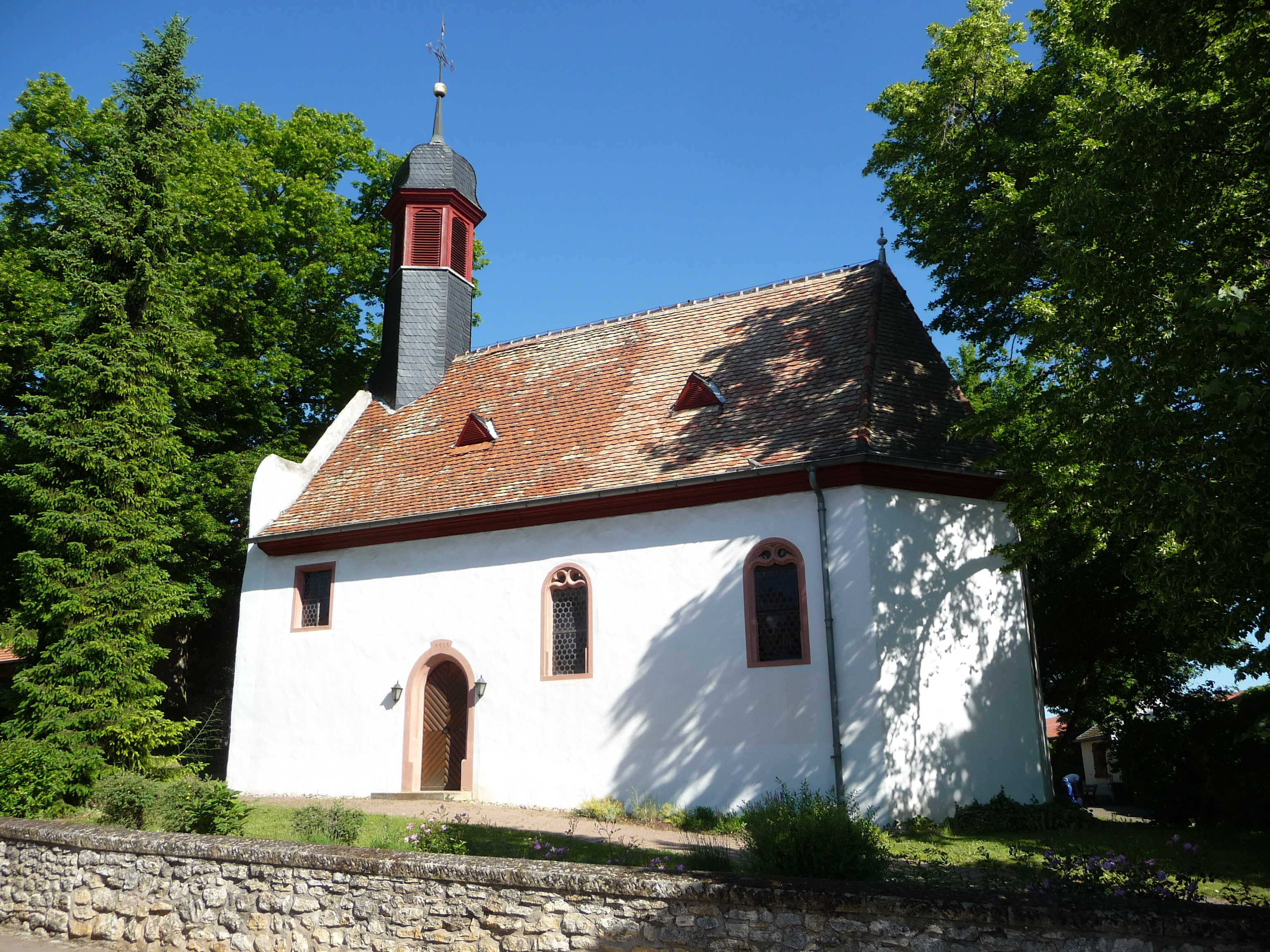 Dintesheim ist ein Dorf im Landkreis Alzey-Worms in Rheinland-Pfalz.